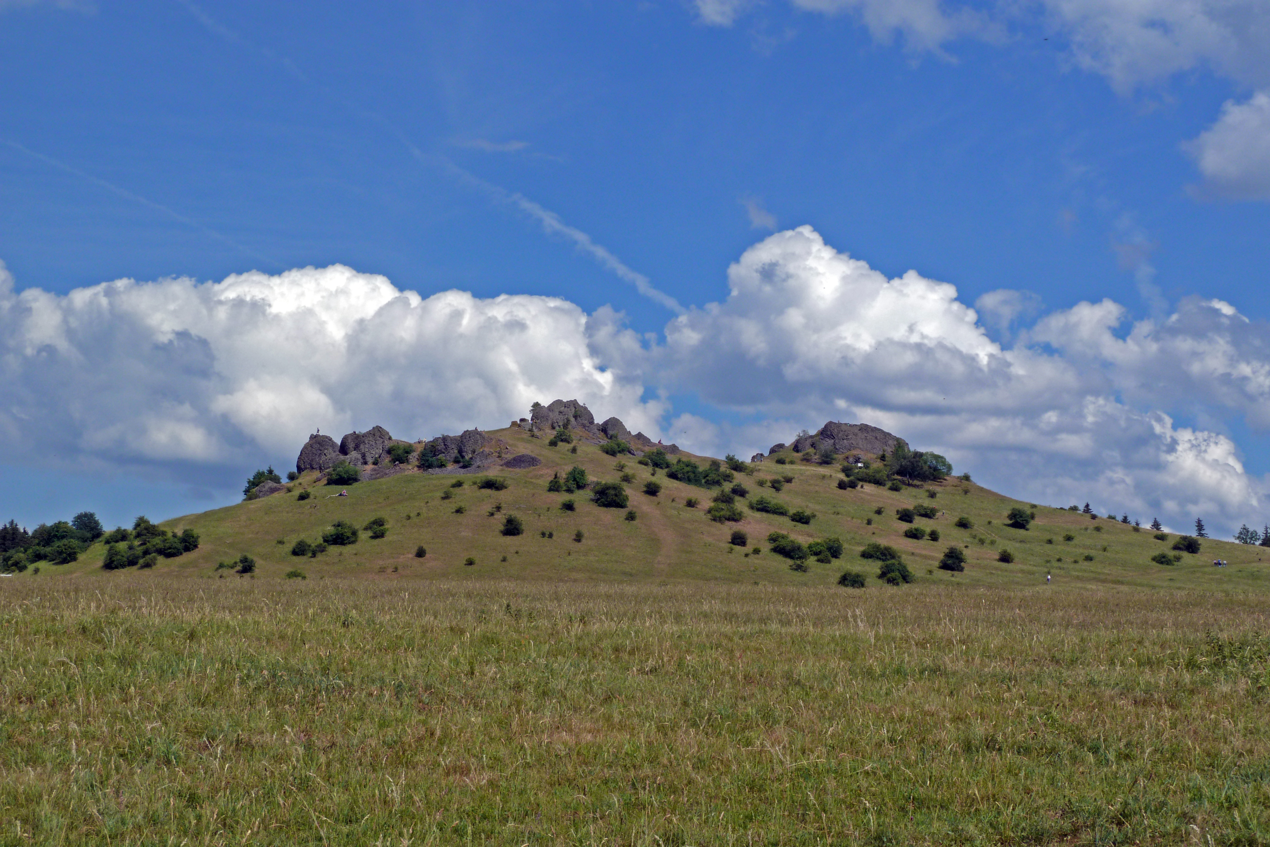 Helfenstein(e) im FFH-Gebiet DE-4622-303 „Dörnberg, Immelburg und Helfenstein“ vom Alpenpfad aus gesehen. Wacholderheide am Dörnberg, Nordhessen. Die auf den Kalk-Magerrasen des Dörnbergs über Jahrhunderte betriebene Beweidung verhinderte Sukzessionsvegetation. Auf den trockenen Böden gedeihen auch seltene Orchideen und Enziane.